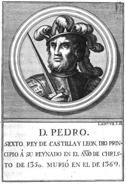 Retrato de Pedro I, conocido por Pedro el Cruel, sexto rey de Castilla y León , ilustración del libro Retratos de los reyes de España, desde Atanarico hasta ... D. Carlos III, editado por Lorenzo de San Martín, 1788.